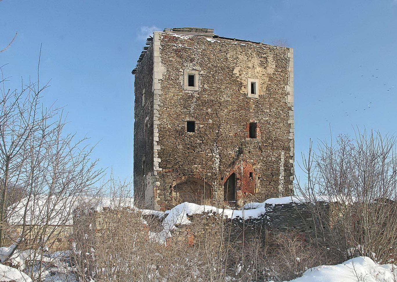 Hradenín - Gotická tvrz ze 14. století. district Kolín autor:Prazak date:26. 1. 2007